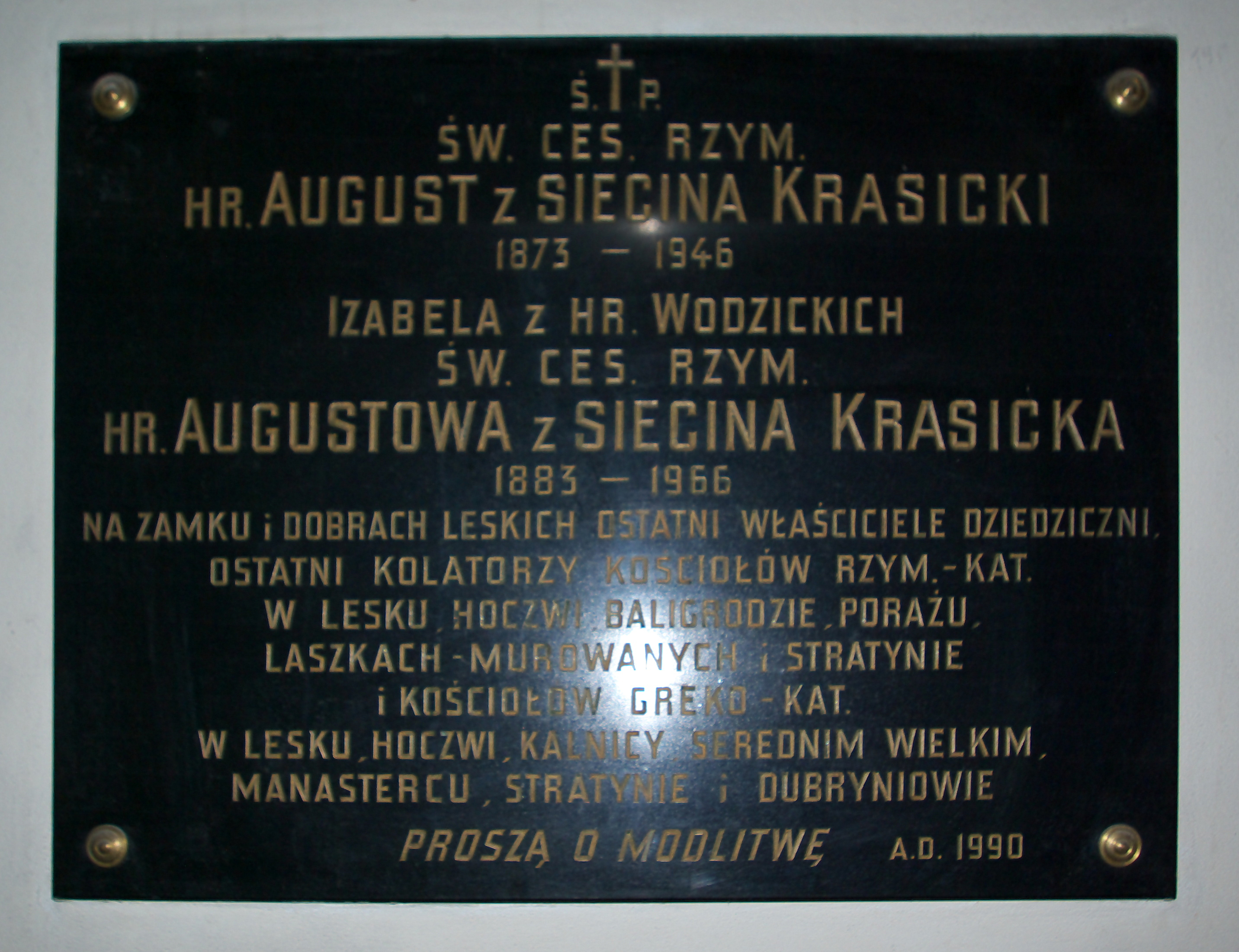 Epitafium Augusta i Izabeli Krasickich w kościele Nawiedzenia Najświętszej Maryi Panny w Lesku.